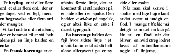 Eksempler på navngivne fejl i typografi.